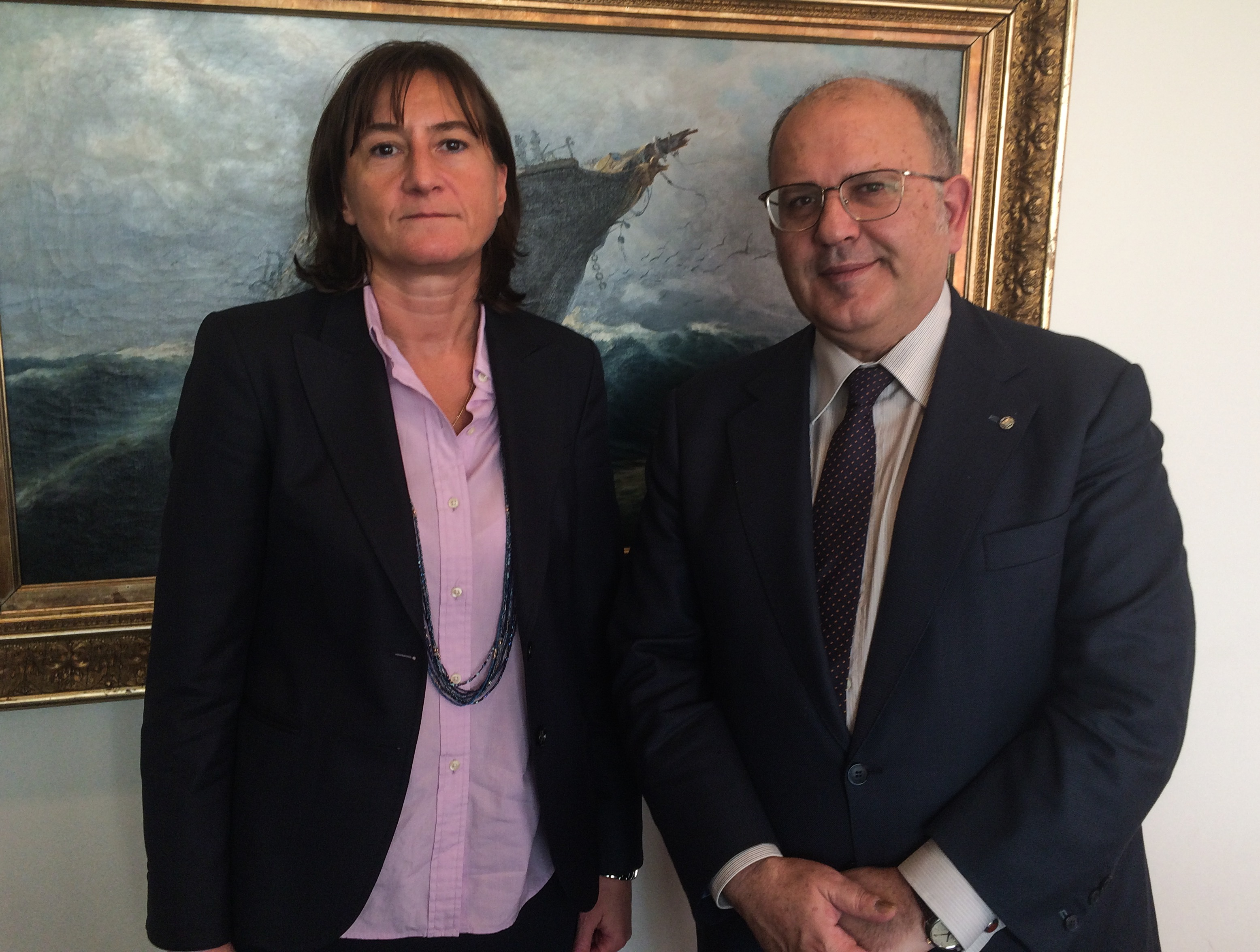 Ο Αναπληρωτής Υπουργός Εξωτερικών για Ευρωπαϊκές Υποθέσεις, κ. Νίκος Ξυδάκης, συναντήθηκε την 3η Νοεμβρίου 2015, στο Υπουργείο Εξωτερικών, με την Πρέσβη της Βουλγαρίας στην Ελλάδα, κα. Emilia Kraleva.